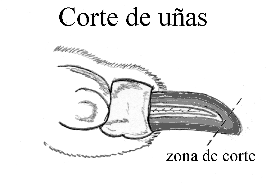 Zona del corte de la uña